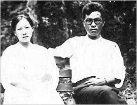 박헌영과 주세죽, 조선 탈출 직후 소련의 어느 공원에서 촬영한 사진(1928년 12월)